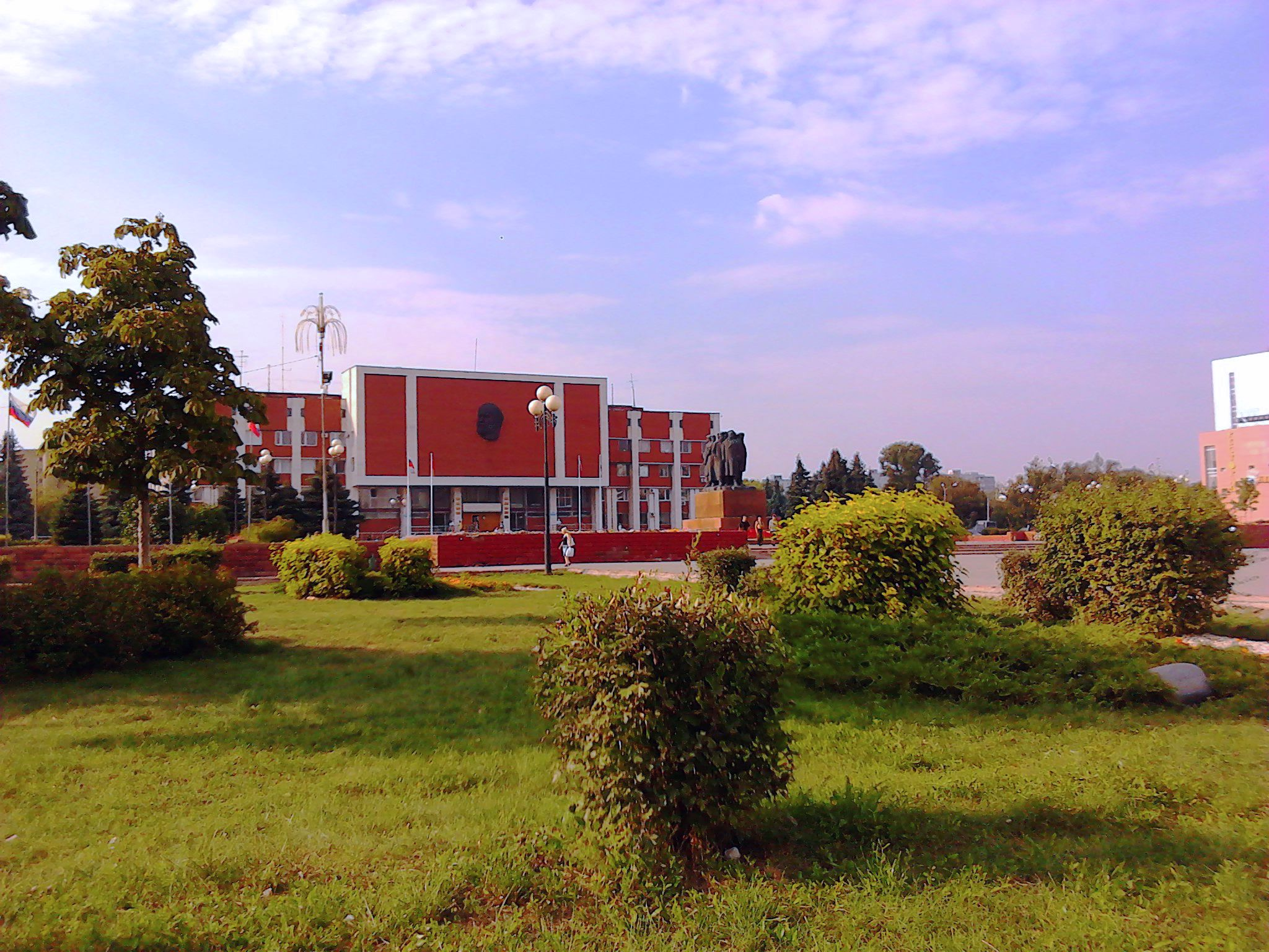 Октябрьская пл., г. Орехово-Зуево, август 2013